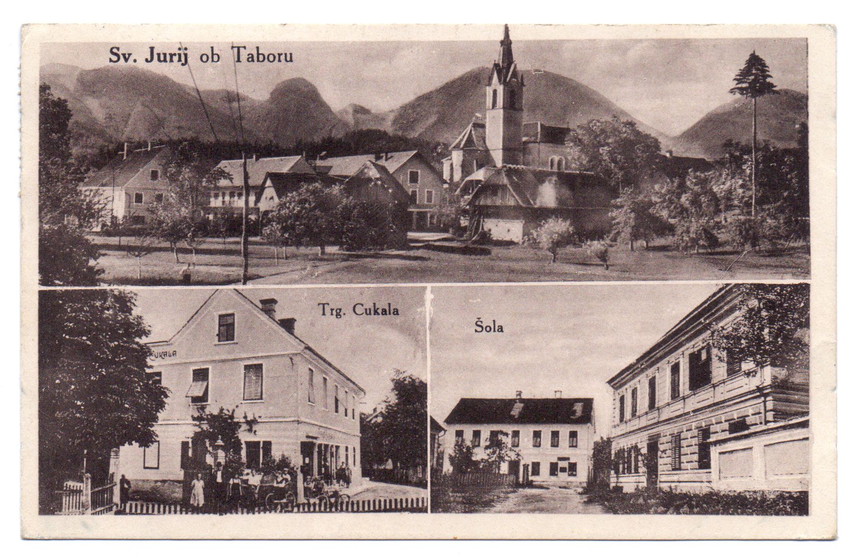 Stara razglednica Tabora.